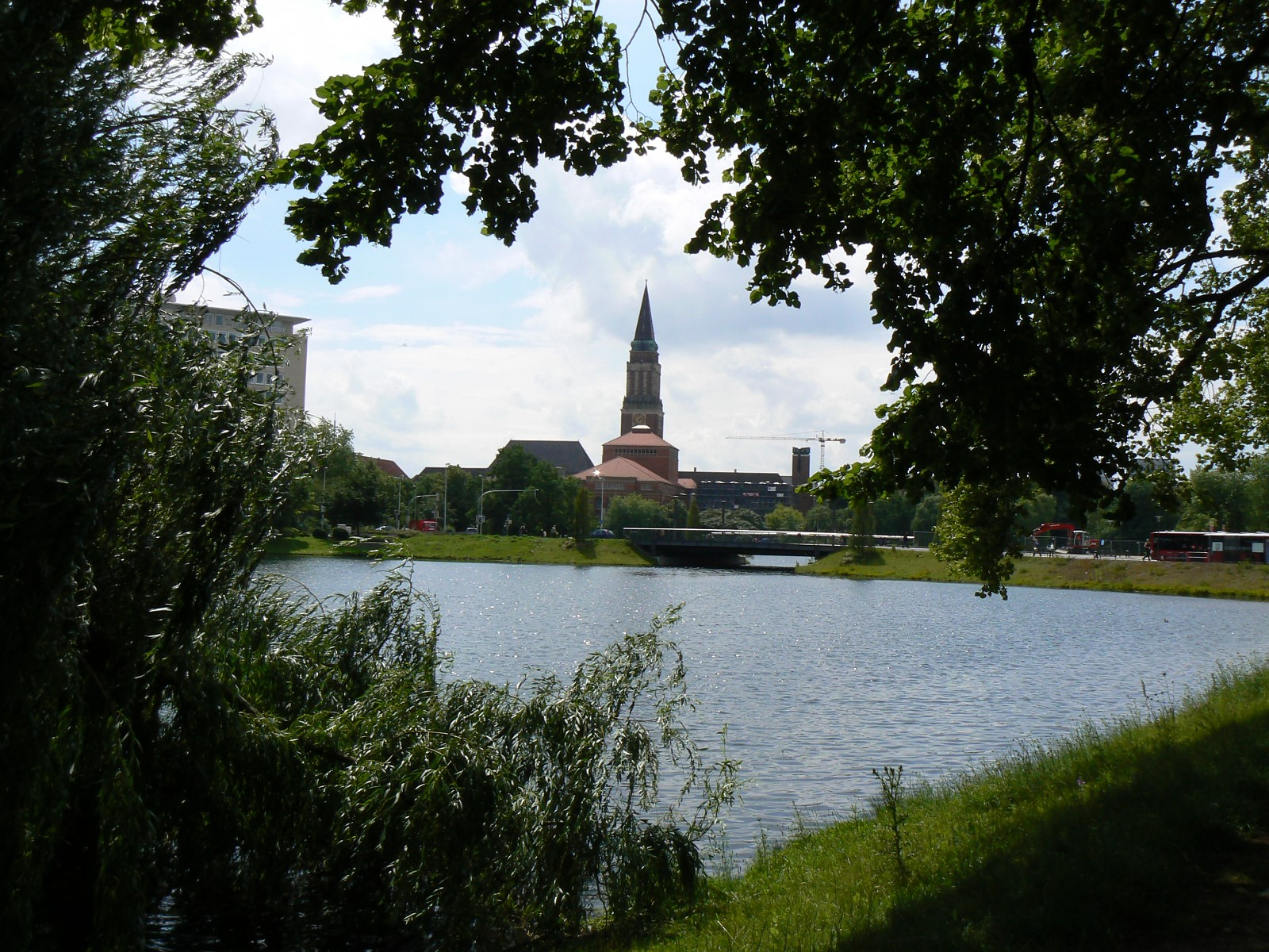 Blick über den Kleinen Kiel in Kiel. Im Hintergrund die Emil-Lueken-Brücke, das Opernhaus und das Kieler Rathaus.